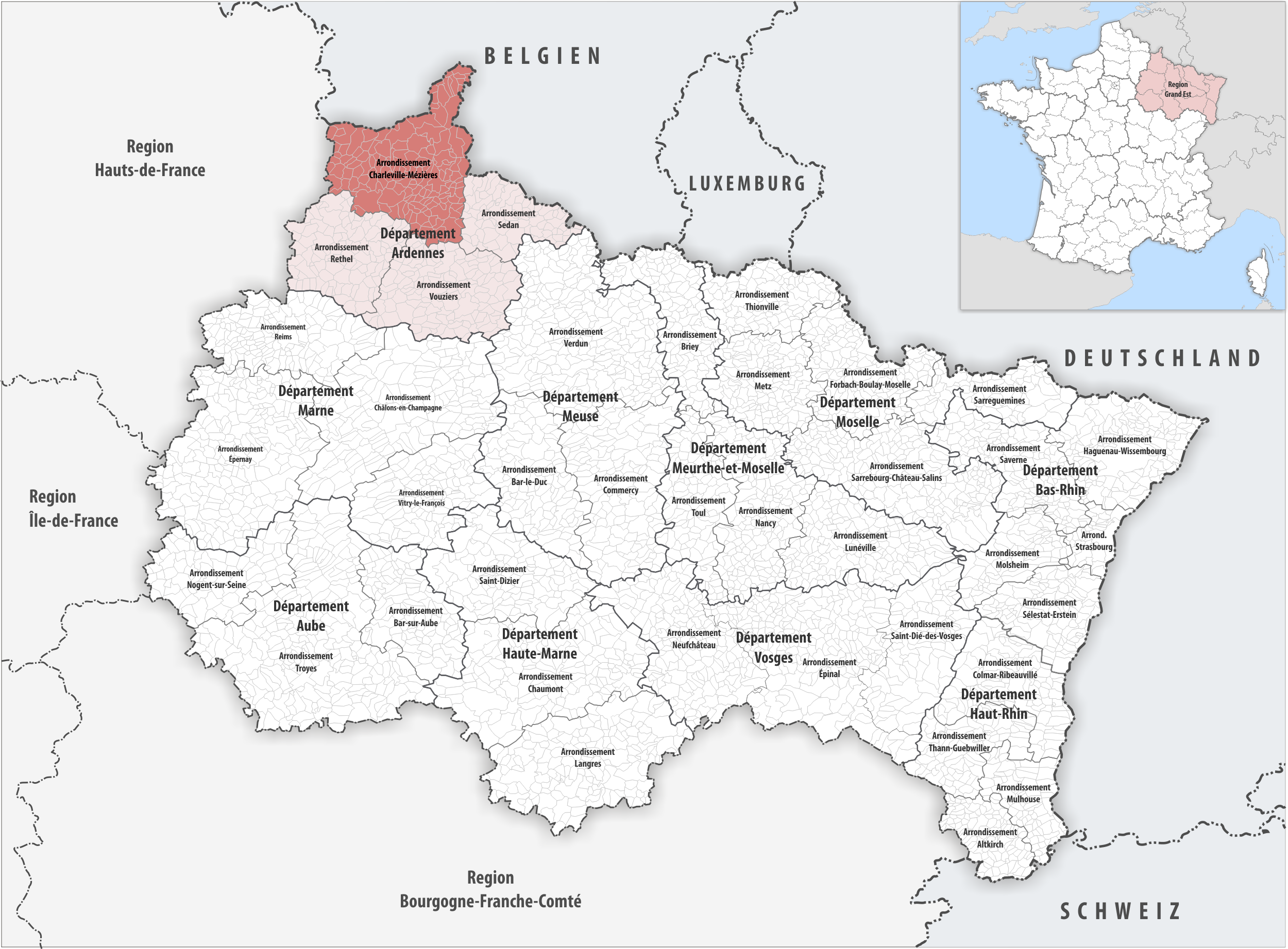 Lage des Arrondissements Charleville-Mézières